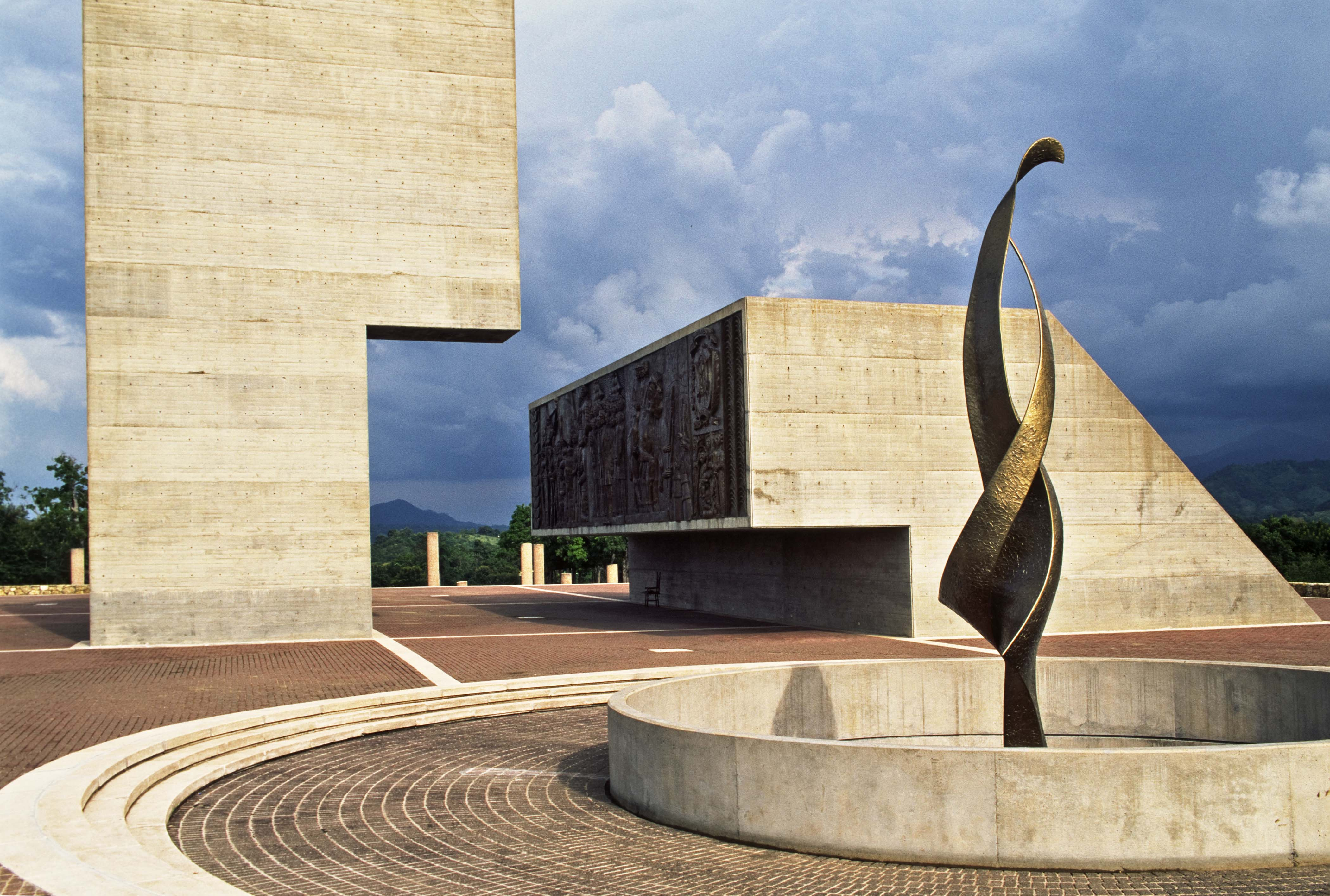 Monumento a la Restauración, Cerro de Capotillo, Dajabón. Wikipedia Monumento al Grito de Capotillo.